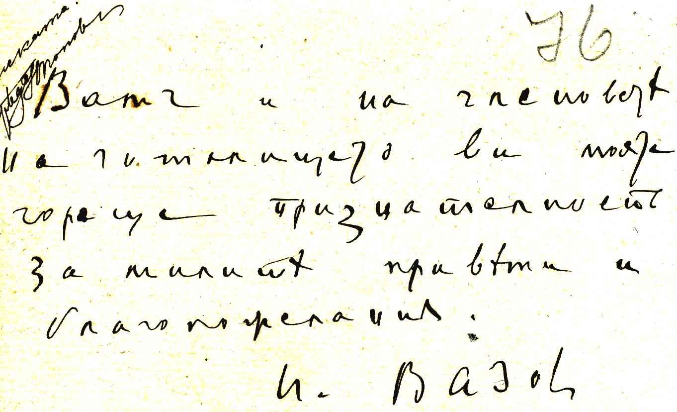 Благодарствено писмо от Иван Вазов до читалище Братство - Кюстендил